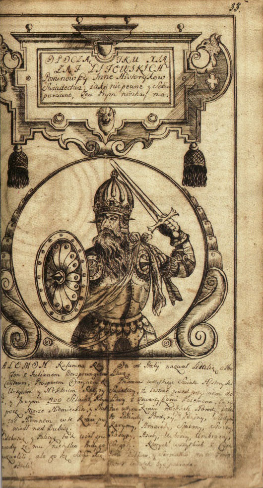 Беларуская (тарашкевіца): Уяўны партрэт легендарнага князя Палямона з рукапісу XVIII ст.